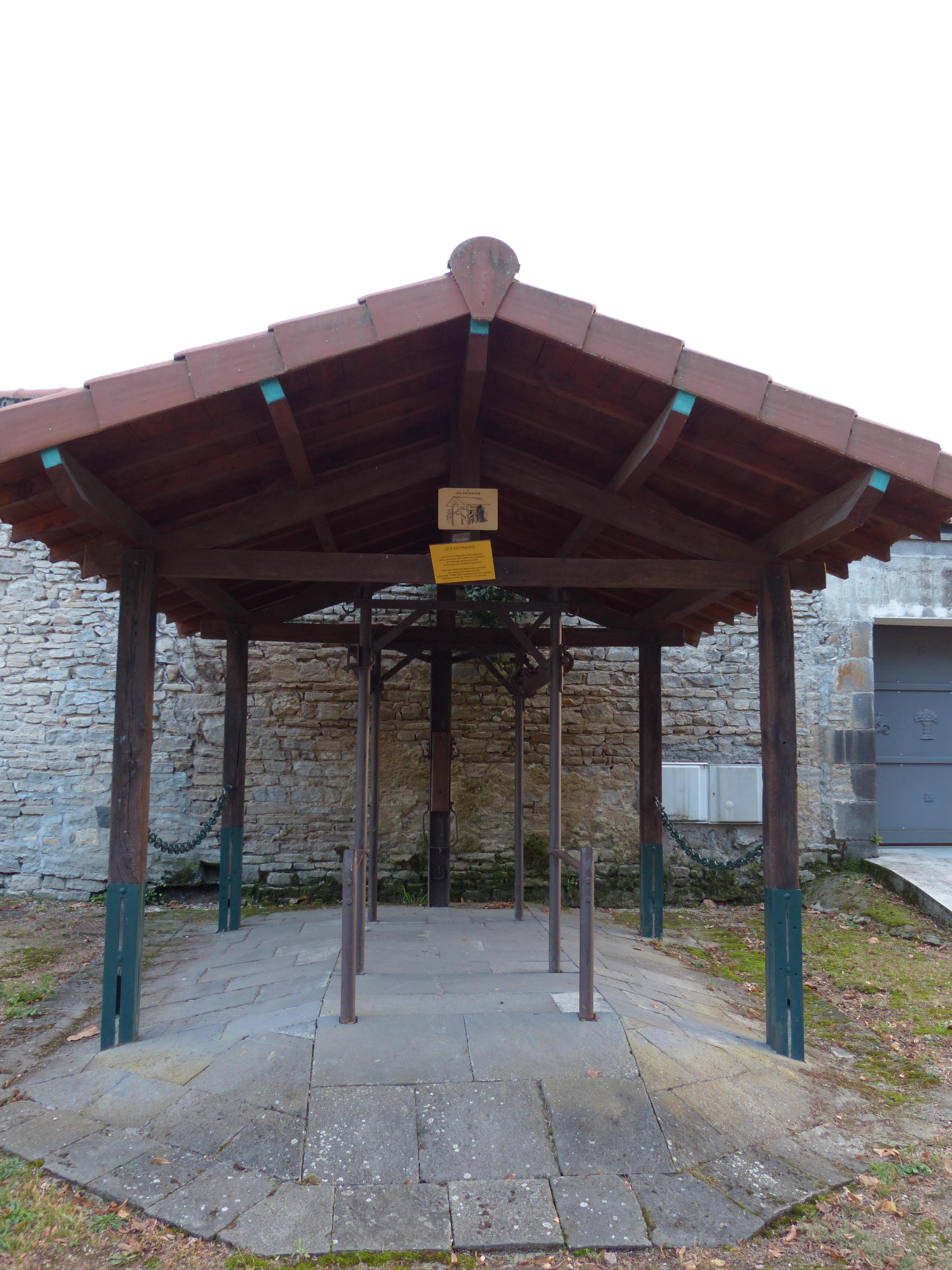 Varennes-sur-Morge (Puy-de-Dôme). Entraves à bestiaux (travail à ferrer).